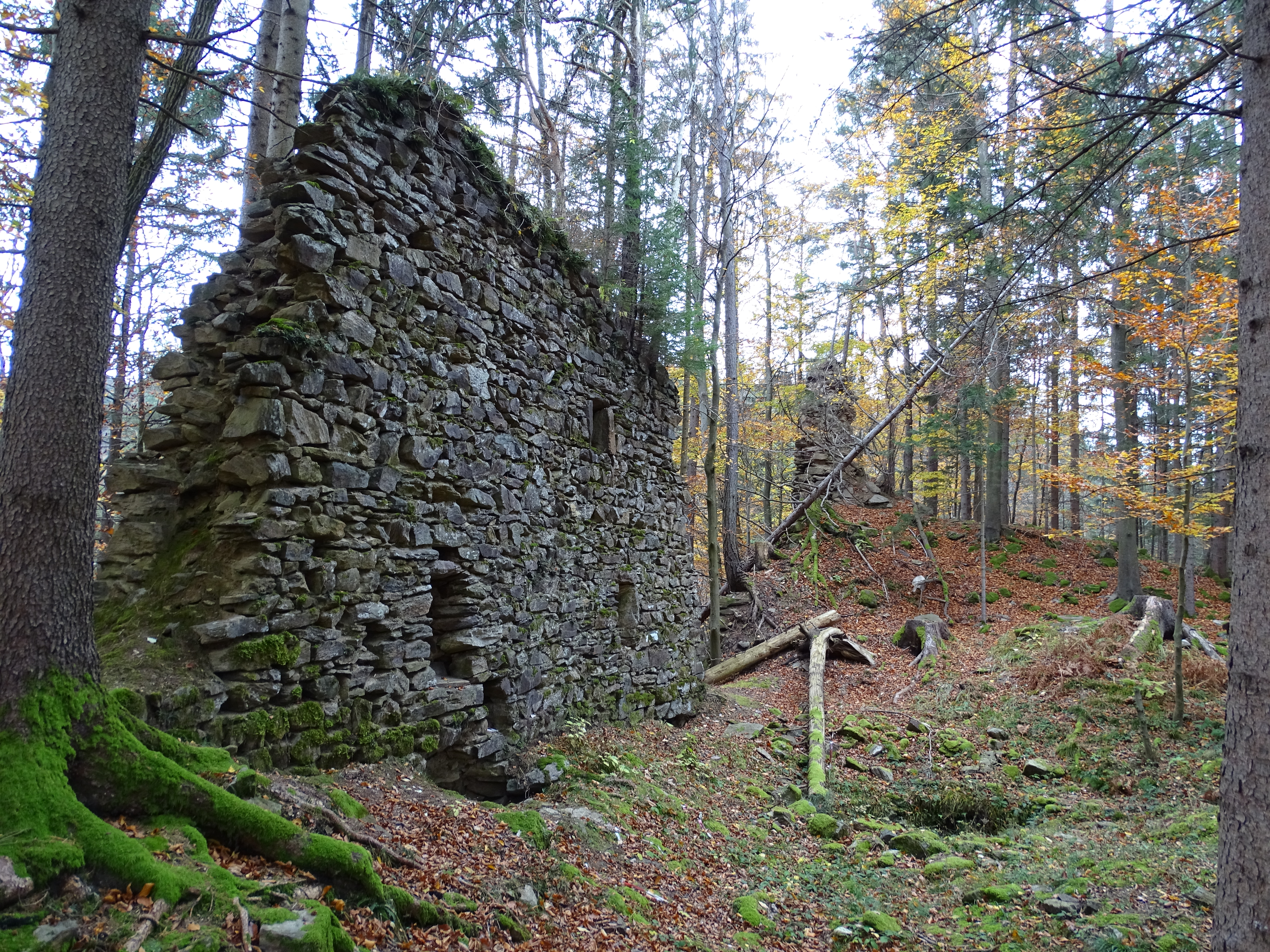 Blick auf die beiden erhalten gebliebenen Teiler der Ringmauer der Burg Alt-Leonroth.